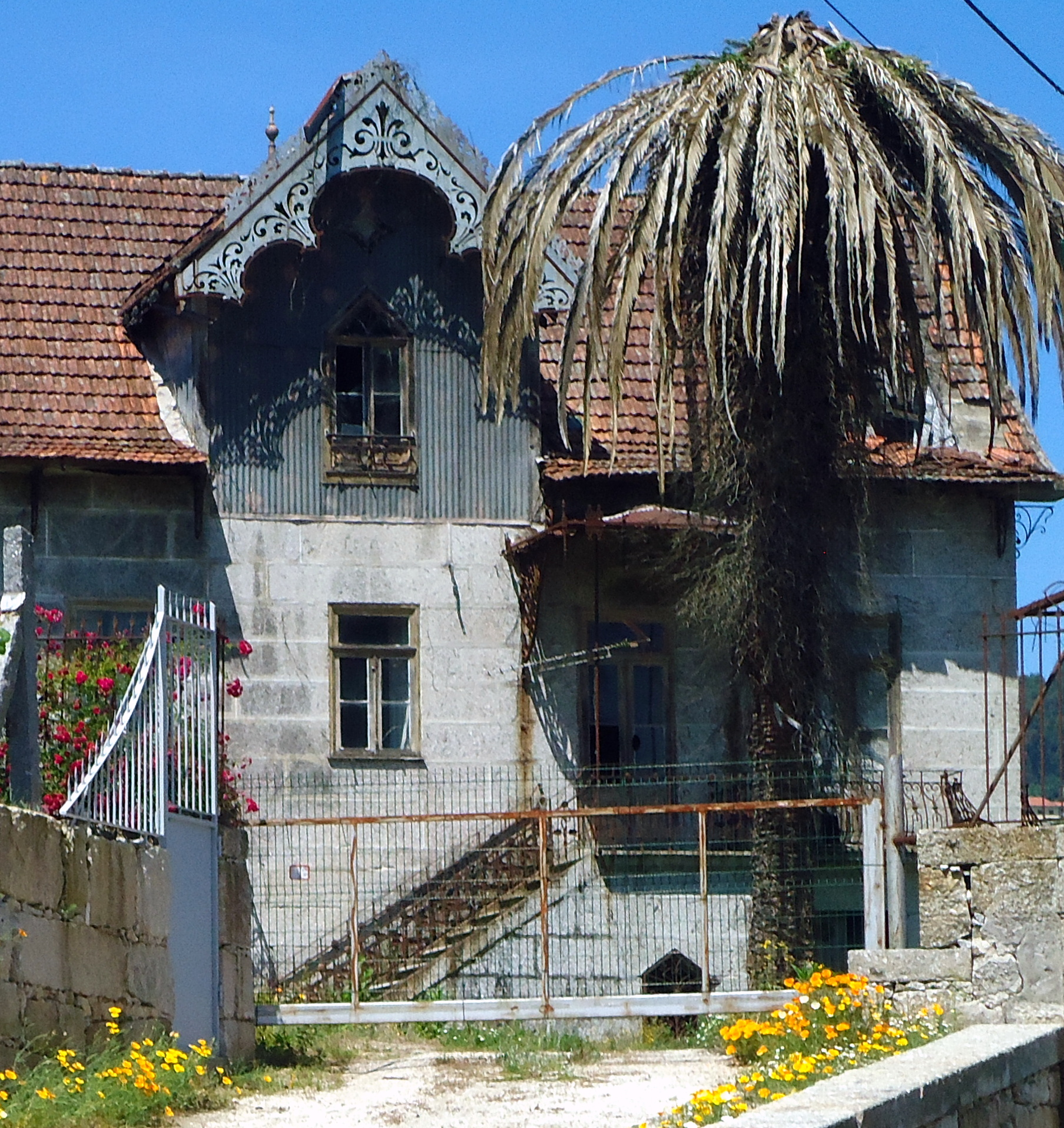 Jugueiros Casas Antigas